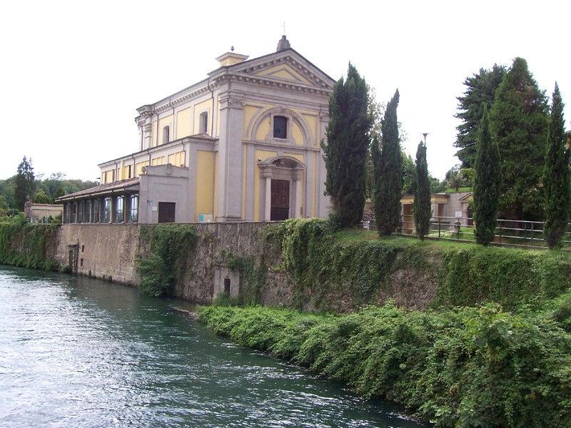 Concesa (Trezzo sull'Adda) - Santuario della Divina Maternità